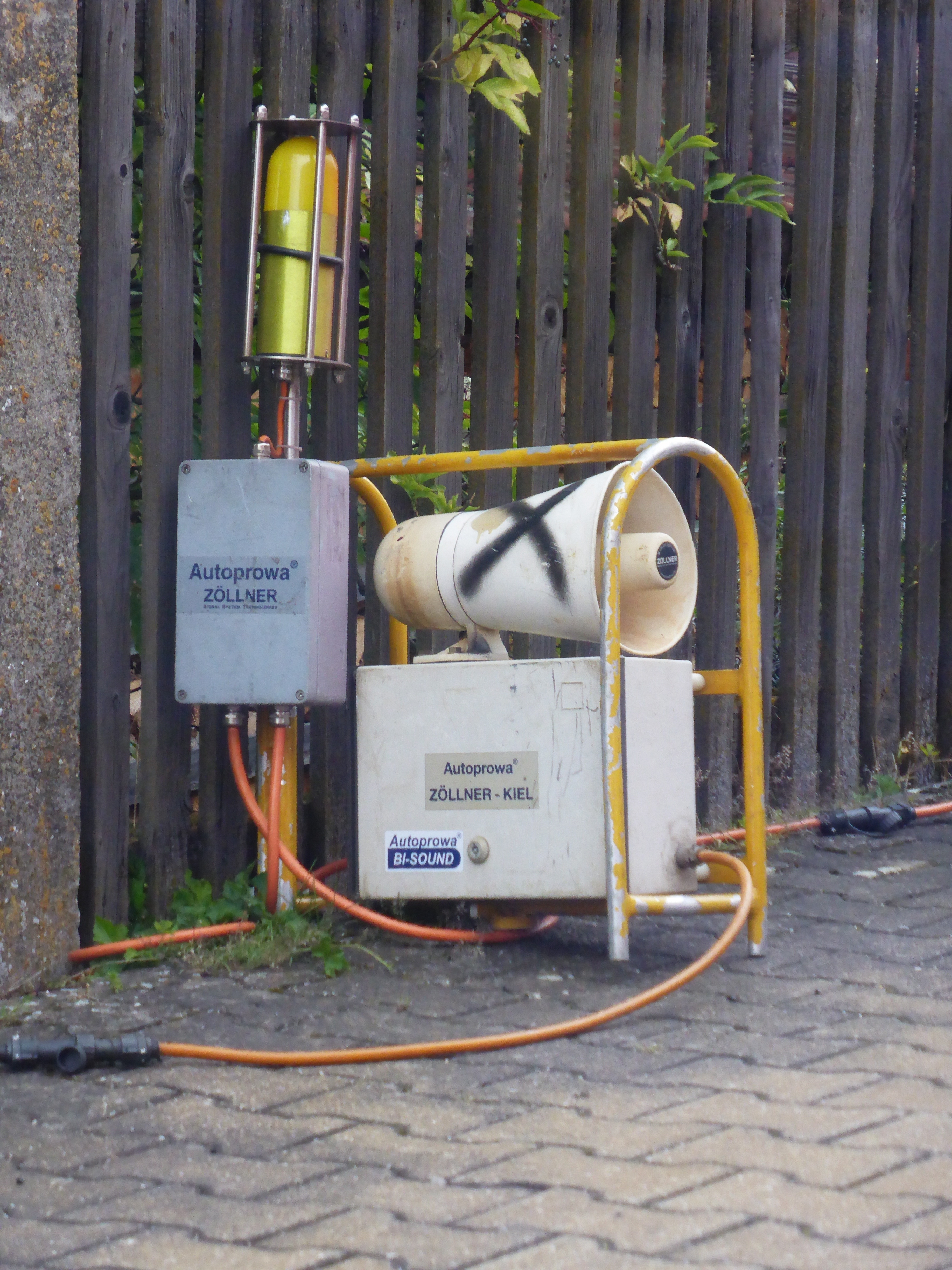 Germany, Mittelfranken